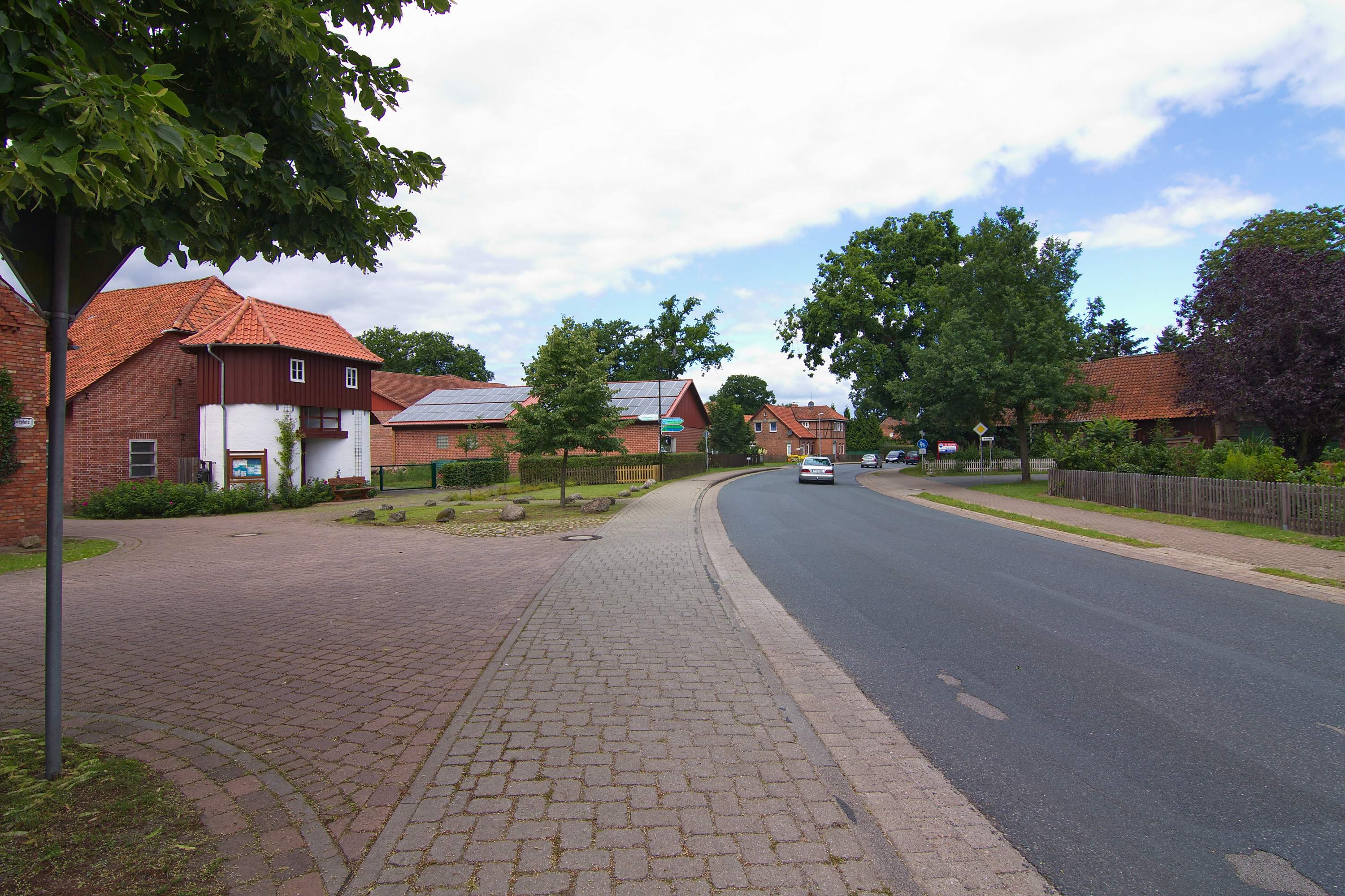 Ortsblick in Hademstorf, Niedersachsen, Deutschland